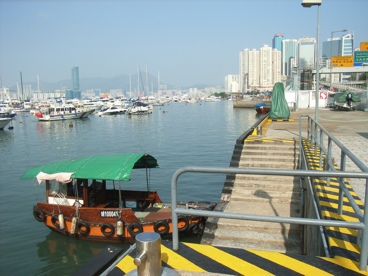 銅鑼灣避風塘 User:Sun Victoria